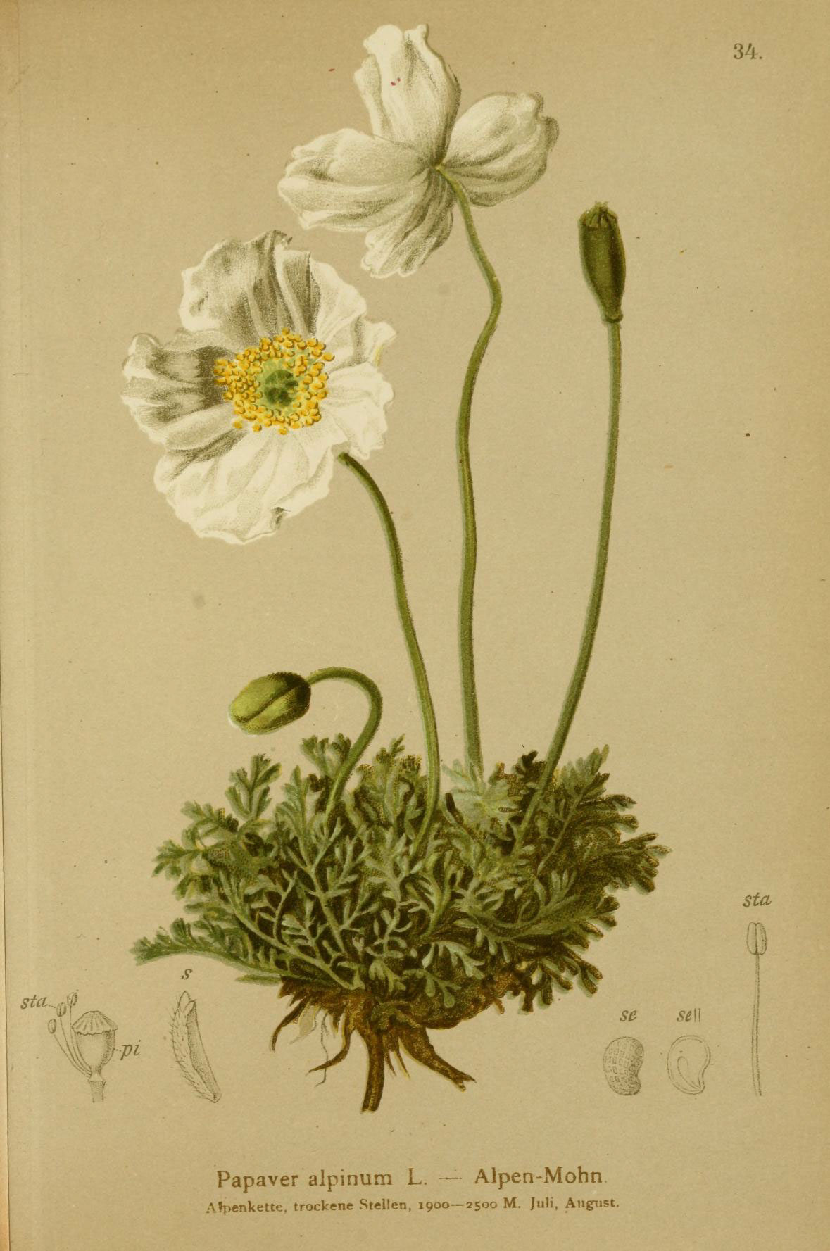 34. stet Papaver alpinum L. — Alpen-Mohn AH.enkette. trockene Stellen, 1900—2500 M. juJi, August.